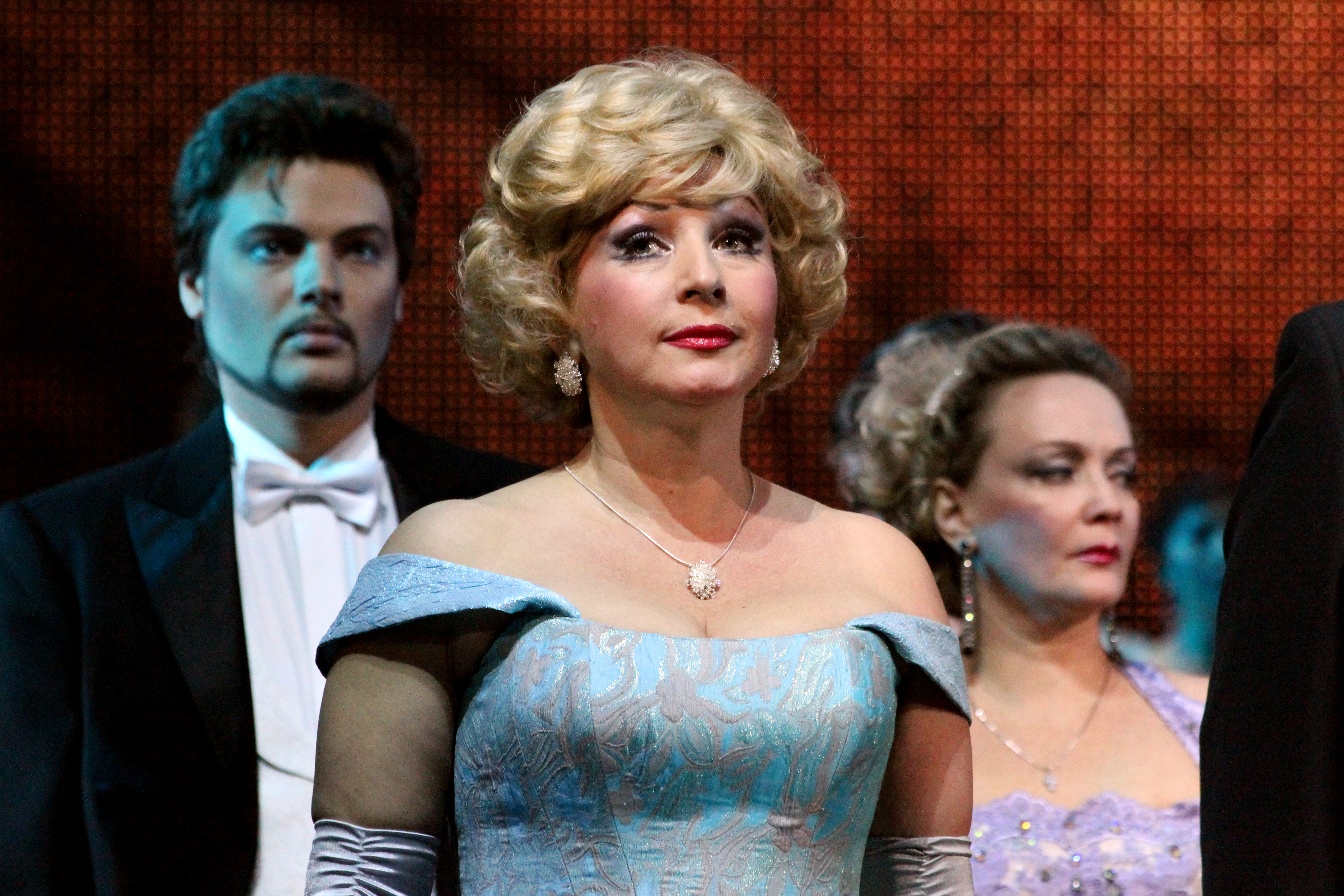 Заслуженная артистка России Елена Ионова